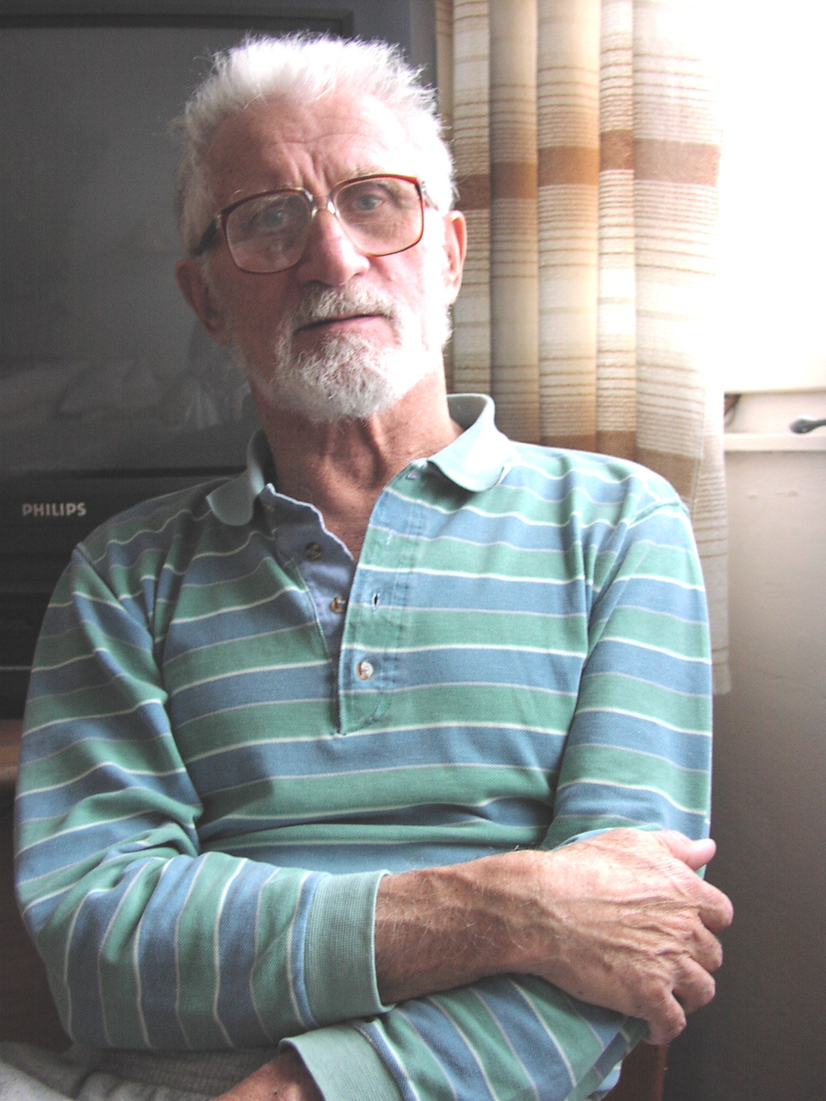 Juraj Valsa